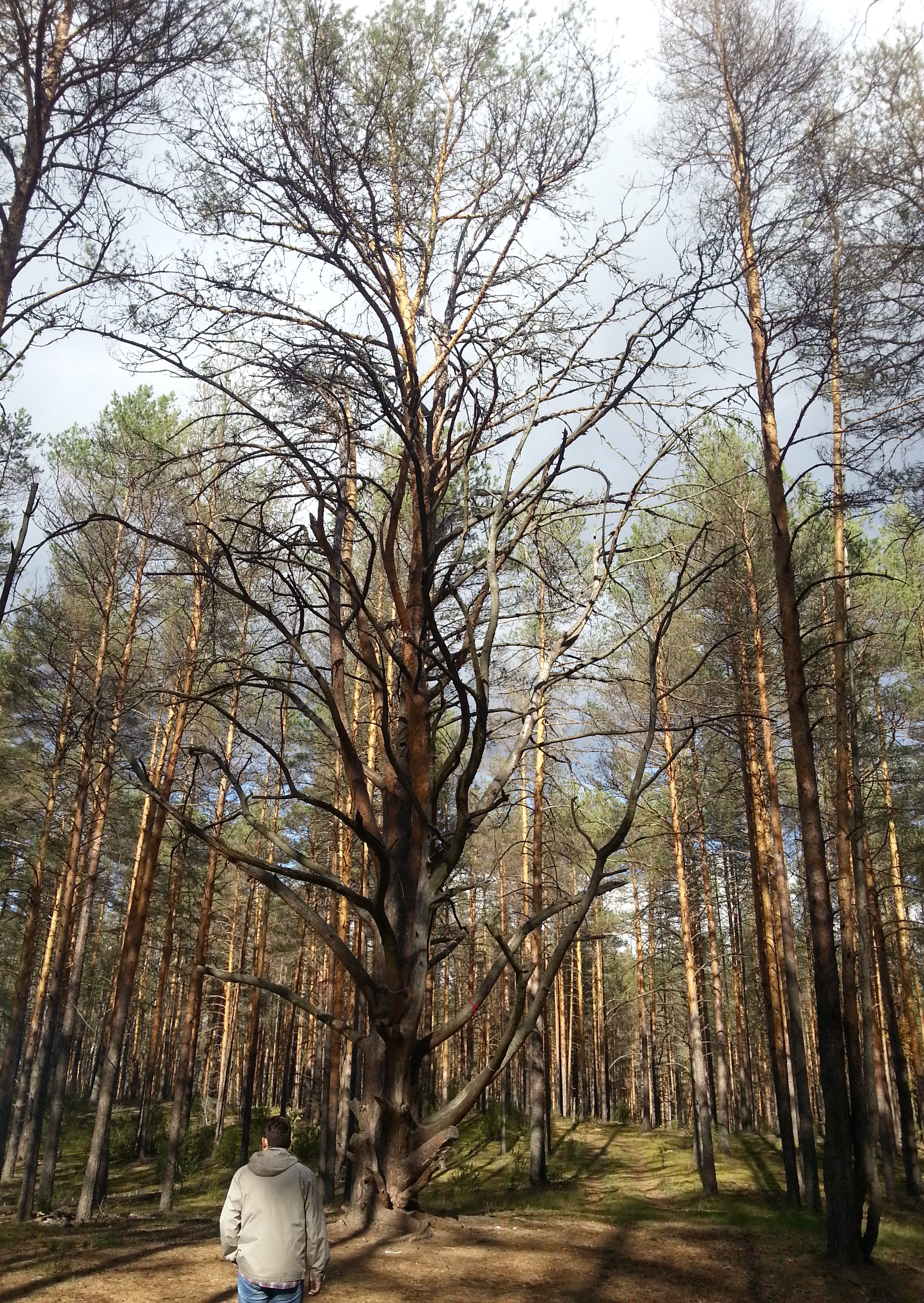 Сосна необычной формы ветвления, Павловский район This image is related to the protected area of Russia number 5210431